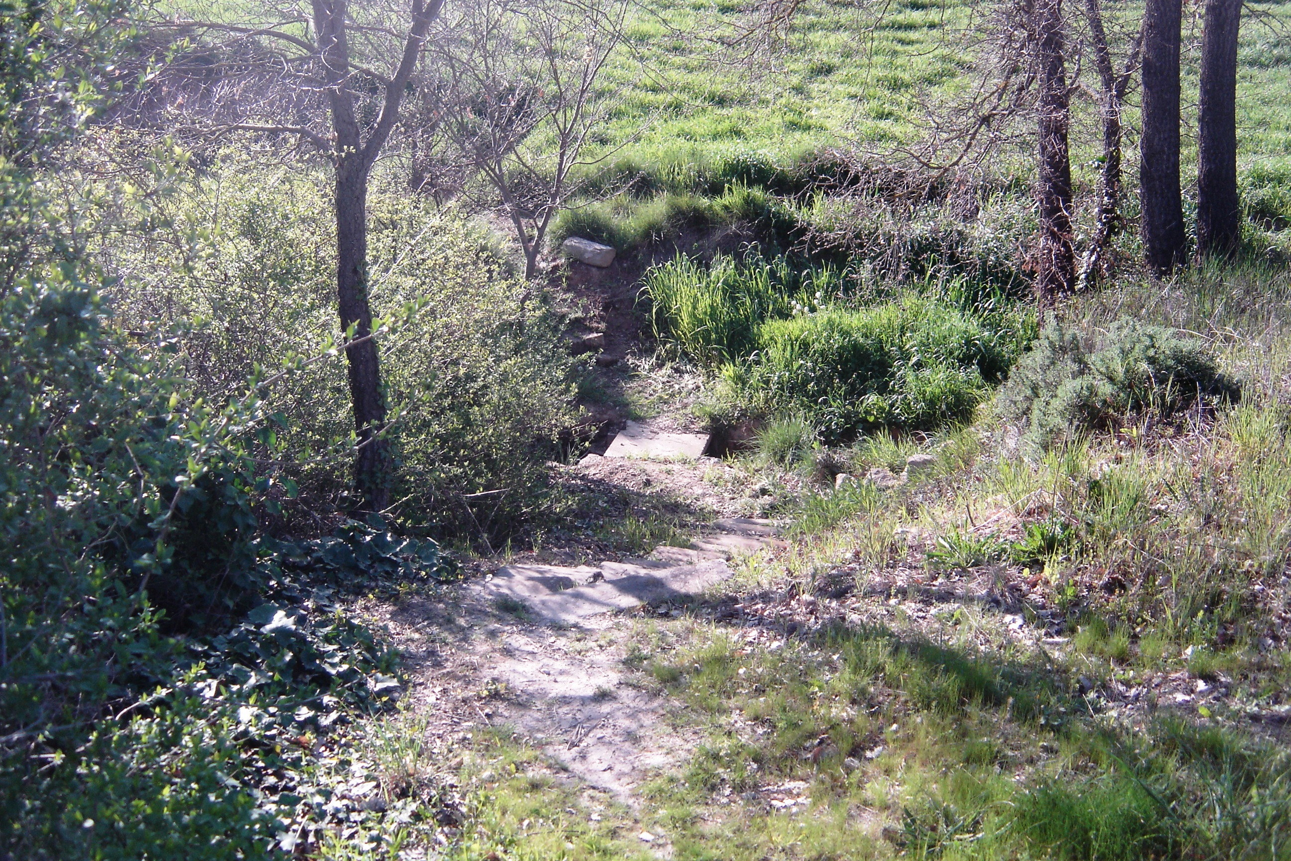 El pontet de llosa del camí que mena cap a la font de Cal Grill (Solsona, Solsonès) visible des de la carretera